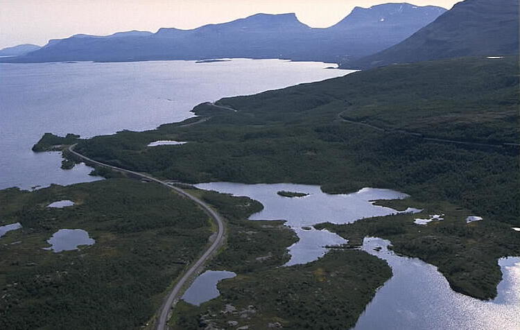 Malmbanan (Ofotenbanan) i bildens högra del. Motiv: Tornehamn Nyckelord: Flygbilder, Riksintressen Kategori: Fjällbygd Malmbanan (Ofotenbanan) i bildens högra del.